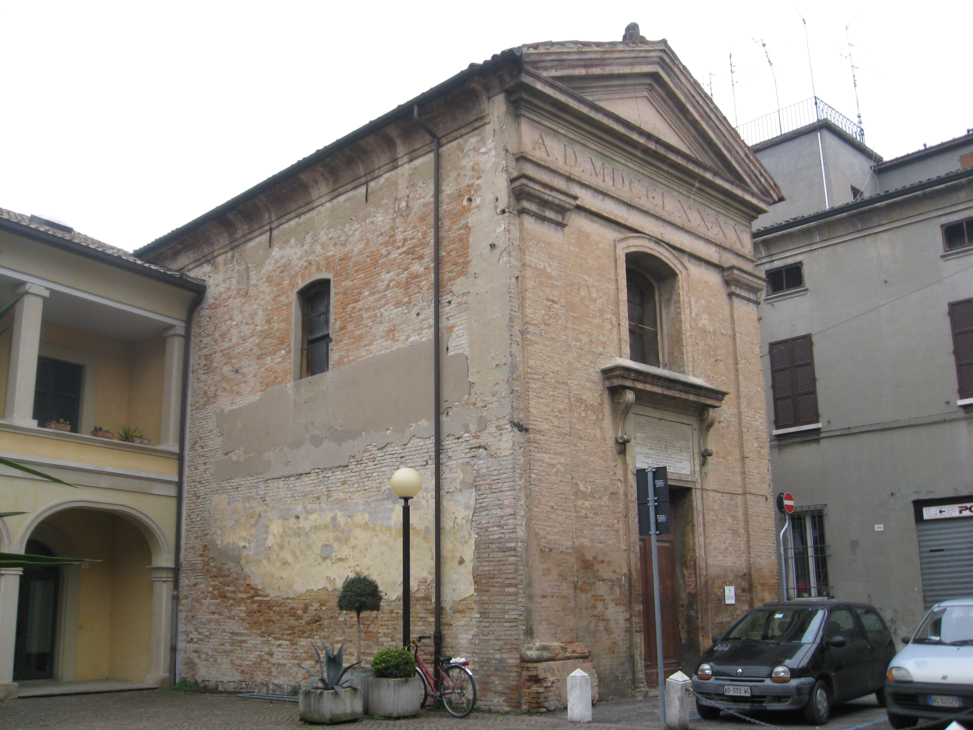 Perkele, Chiesa di San Francesco Regis a Forlì, vista laterale